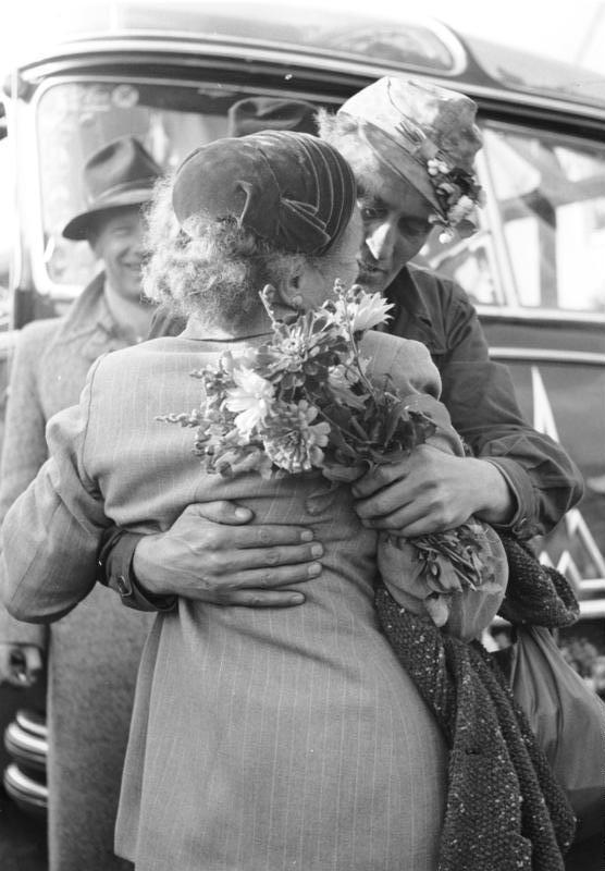 Heimkehrer im Lager Friedland - 1955